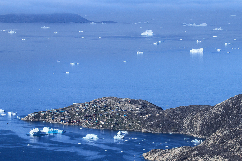 Kullorsuaq, Westgrönland, Blick Richtung Westen